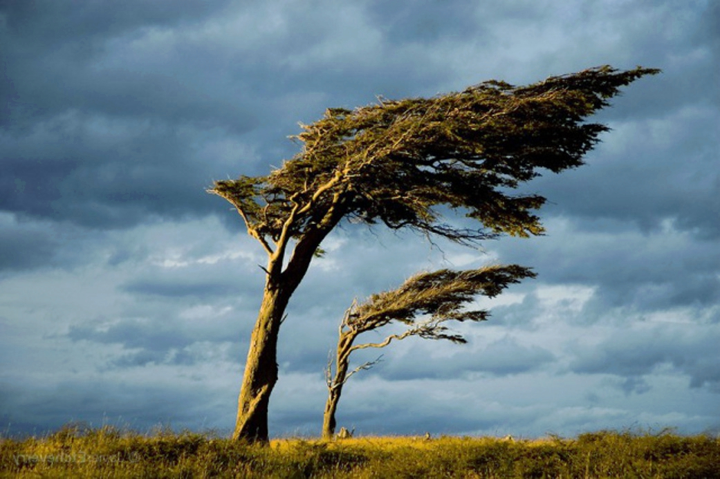 Деревья на ветру